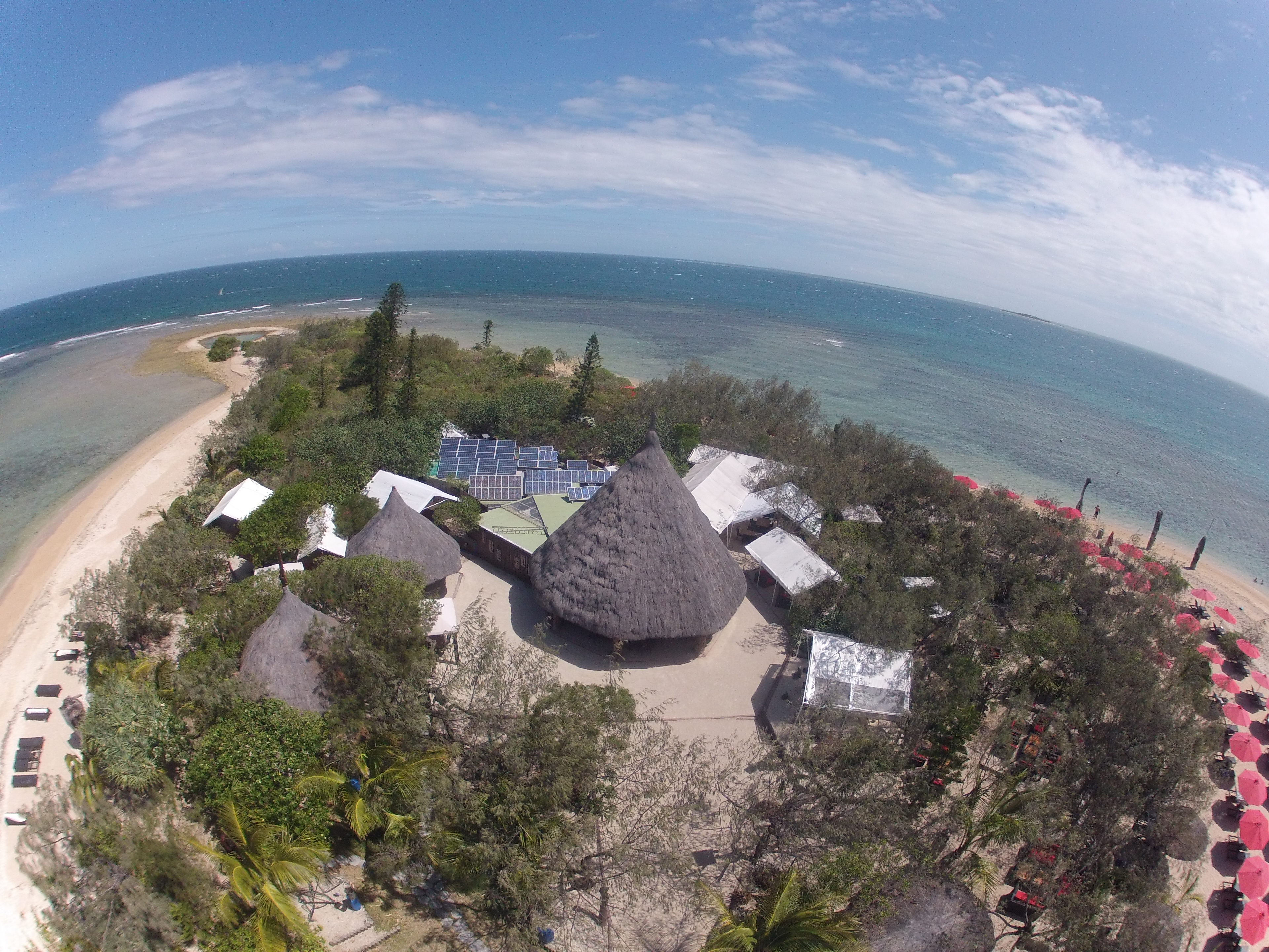 Ile aux canards, Nouméa, Nouvelle-Calédonie